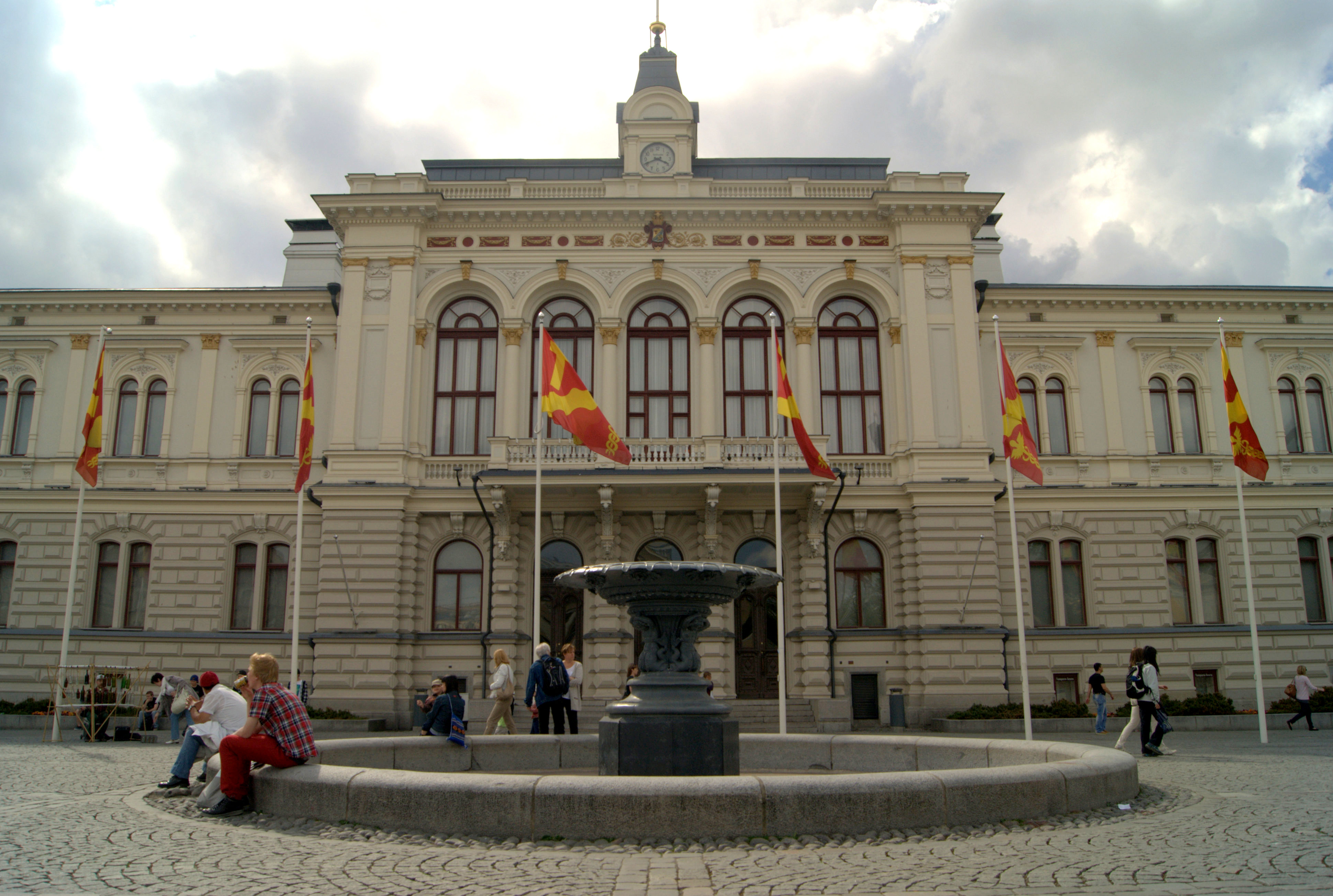 Keskustorin suihkukaivo (1880) - Robert Huber. Sijainti: Keskustori / Raatihuoneen edustalla